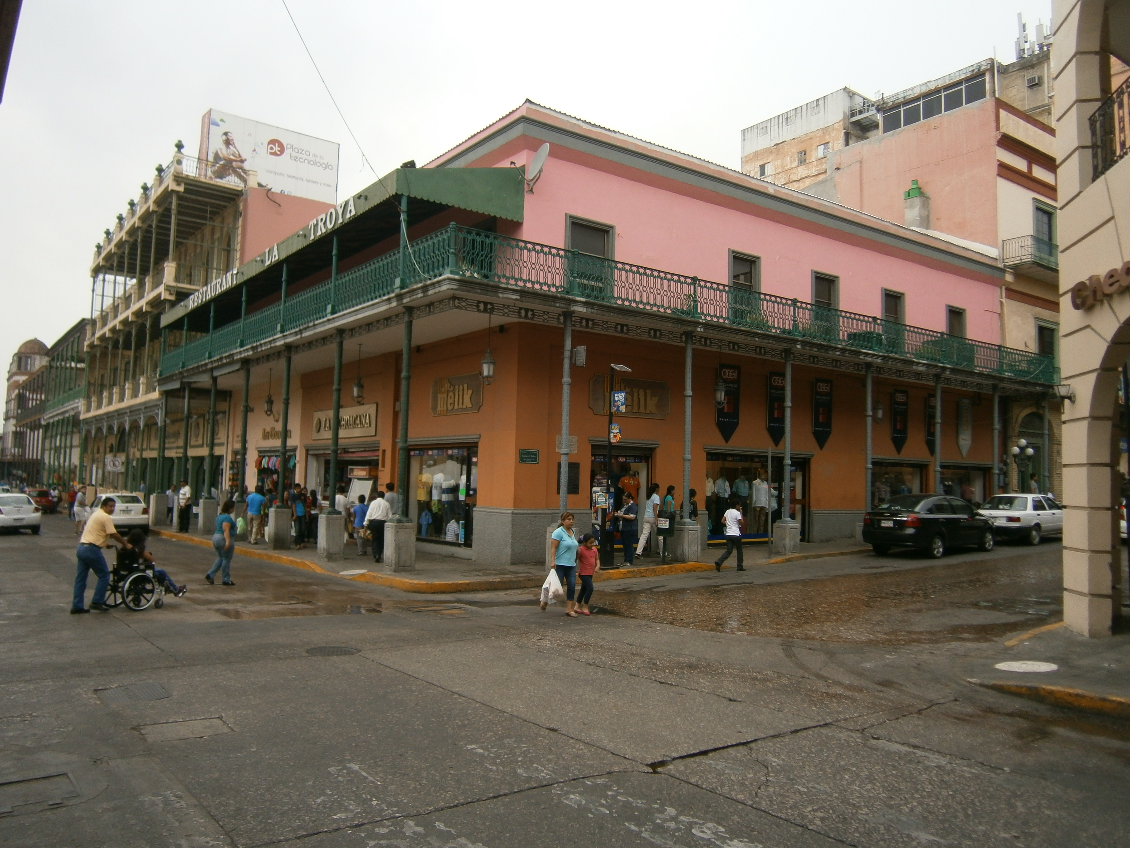 Antigua Casa de Castilla al 2015